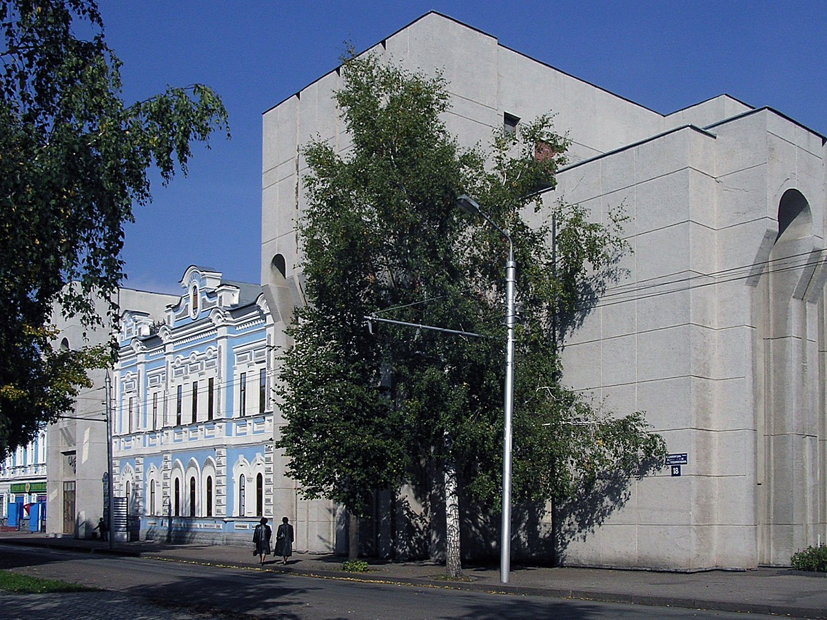 Драмтеатр Стерлитамак